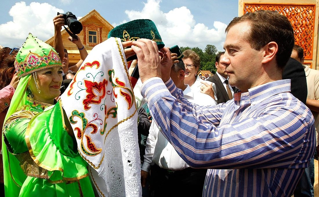 На национальном празднике Сабантуй.